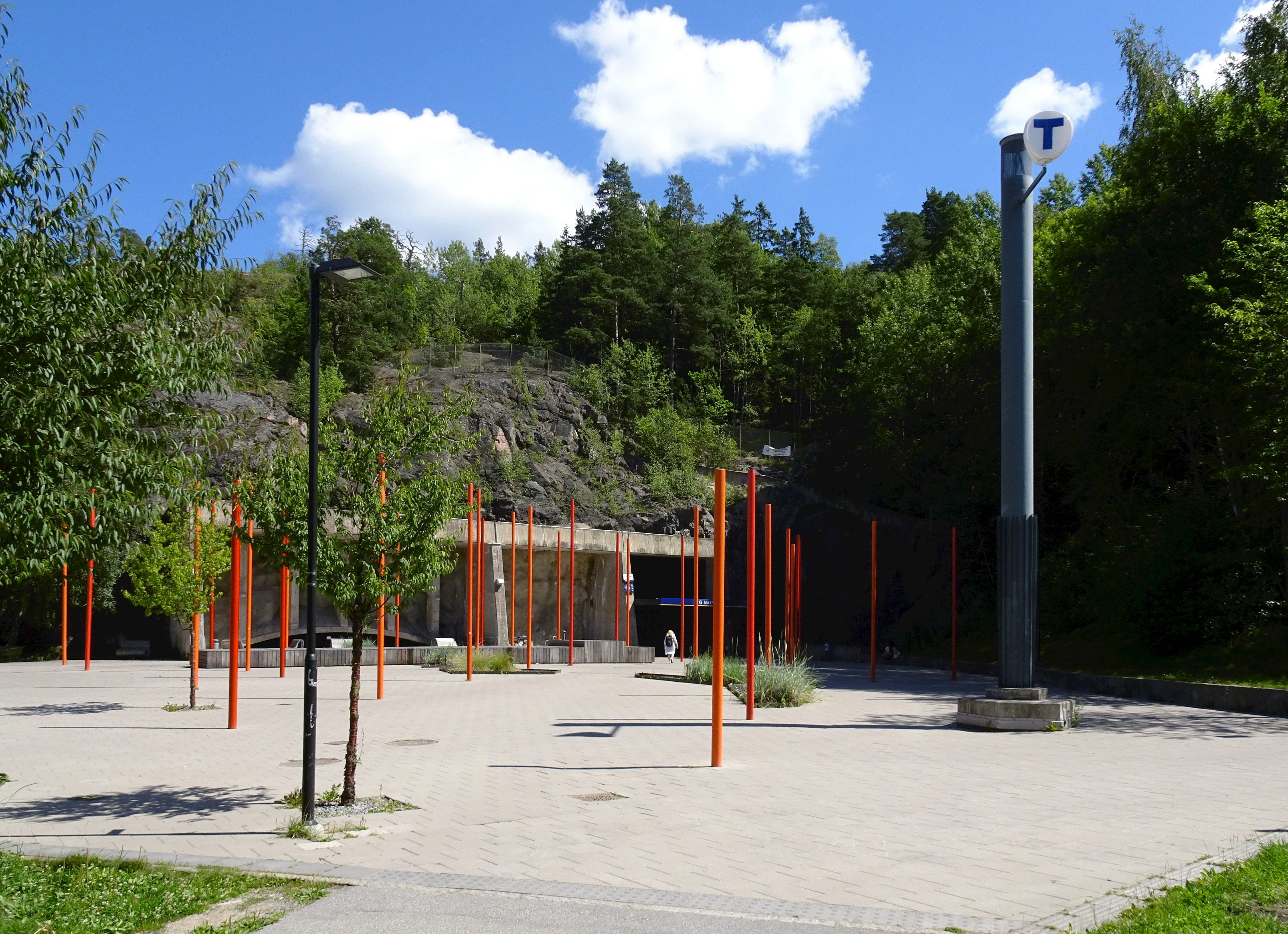 Masmo tunnelbanestation med ett 40-tal orange-röda pinnar. "Installationen" har inget namn, men är skapat av arkitektbyrån Land arkitektur, Anders Kling. Pelaren hör inte till installationen utan är ett ventilationstorn.